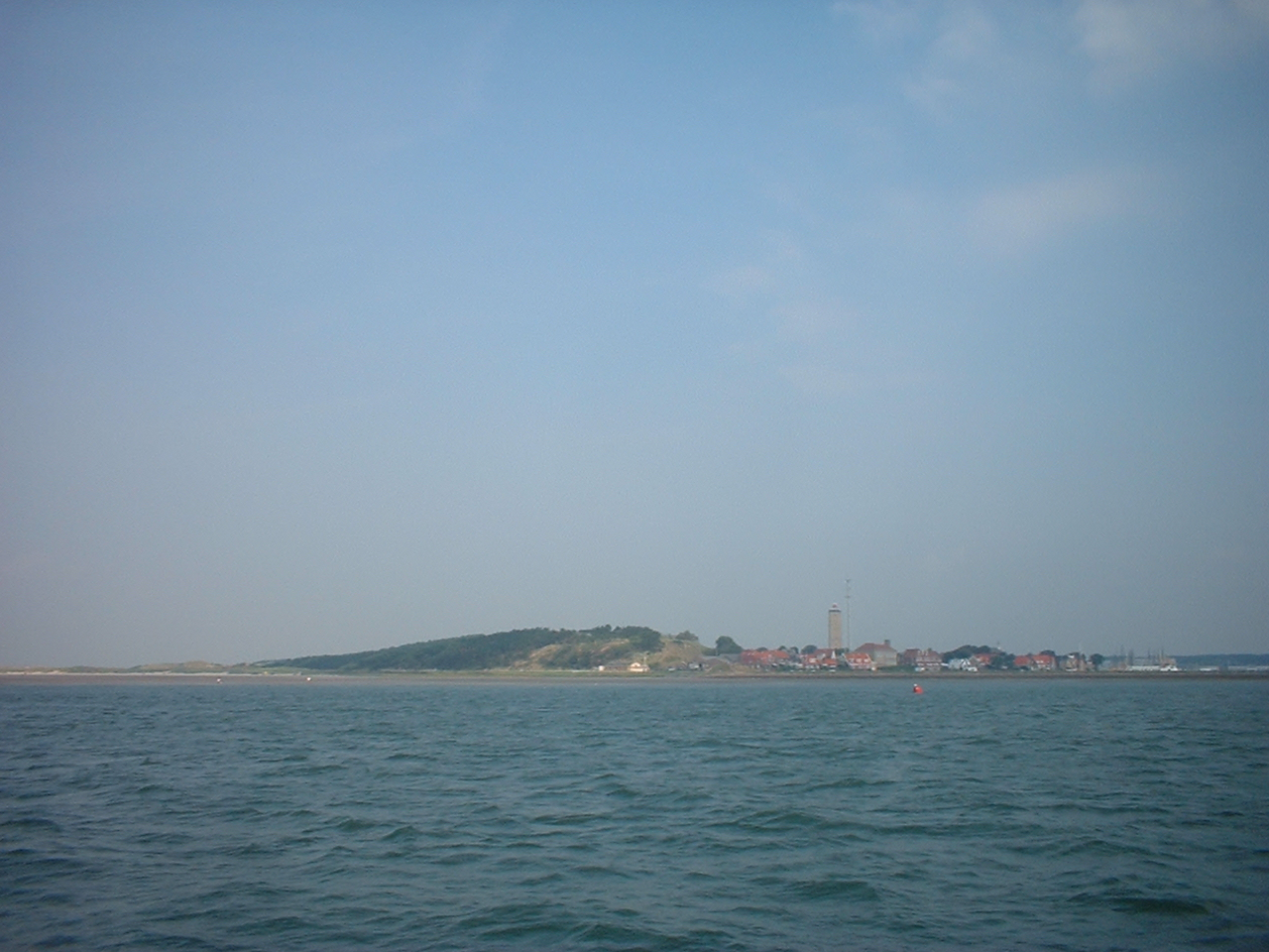 Terschelling